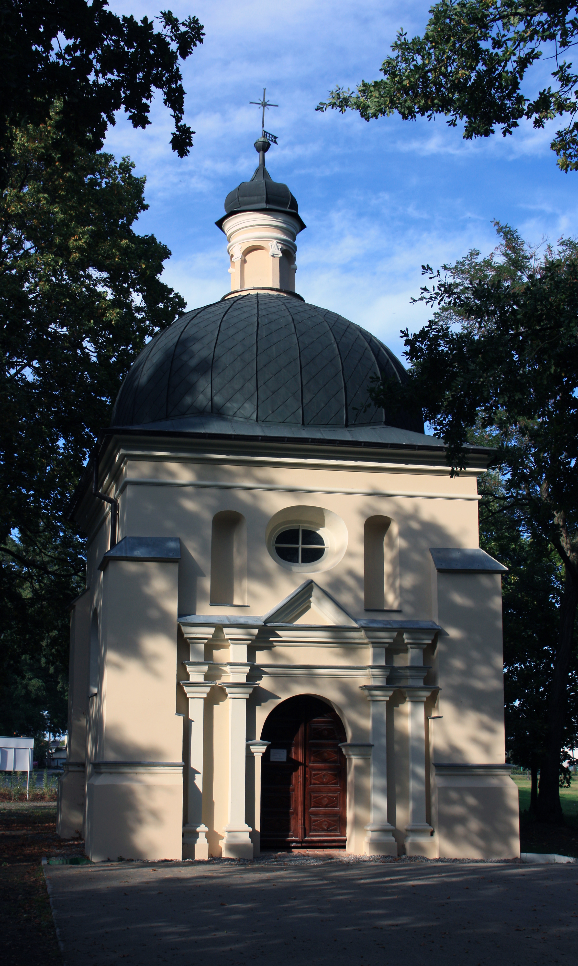 zespół kalwarii, XVII-XIX w.: 25 kaplic; tzw. klasztorek (plebania) Pakość Kapliczka - Herod